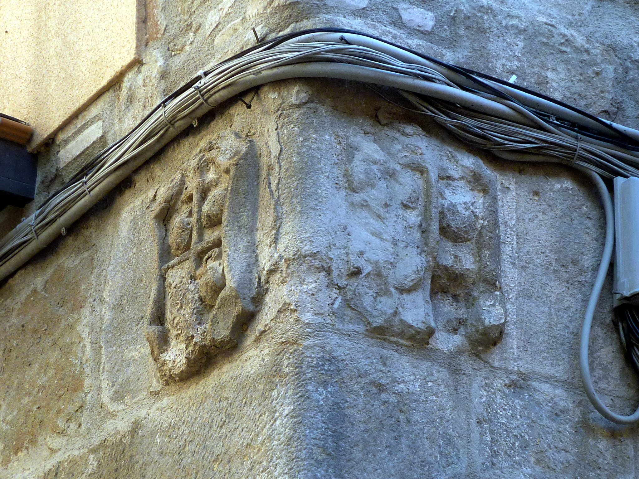 Cal Meliton (Solsona): baix relleu a la cantonada